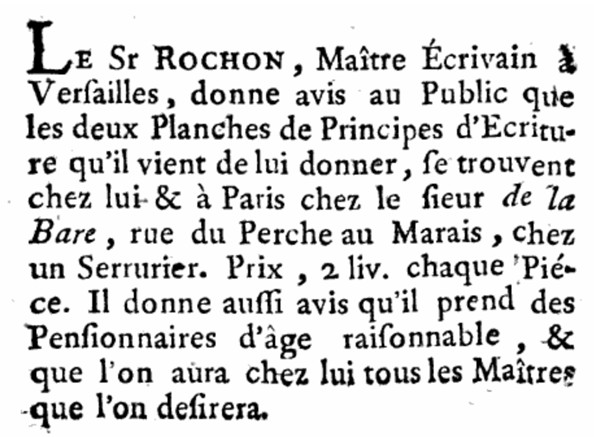 Annonce du maître écrivain Rochon dans le Mercure de France, juin 1763, p. 181.